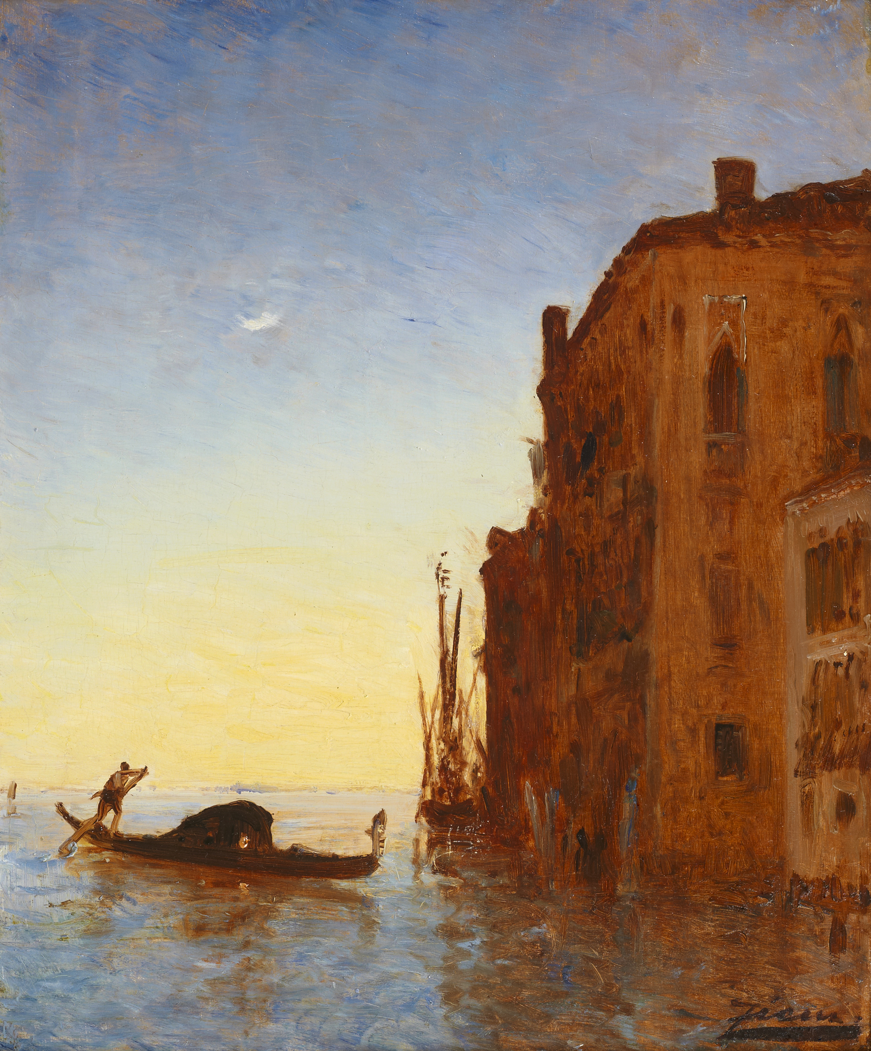 Gondole sur la lagune, Venise